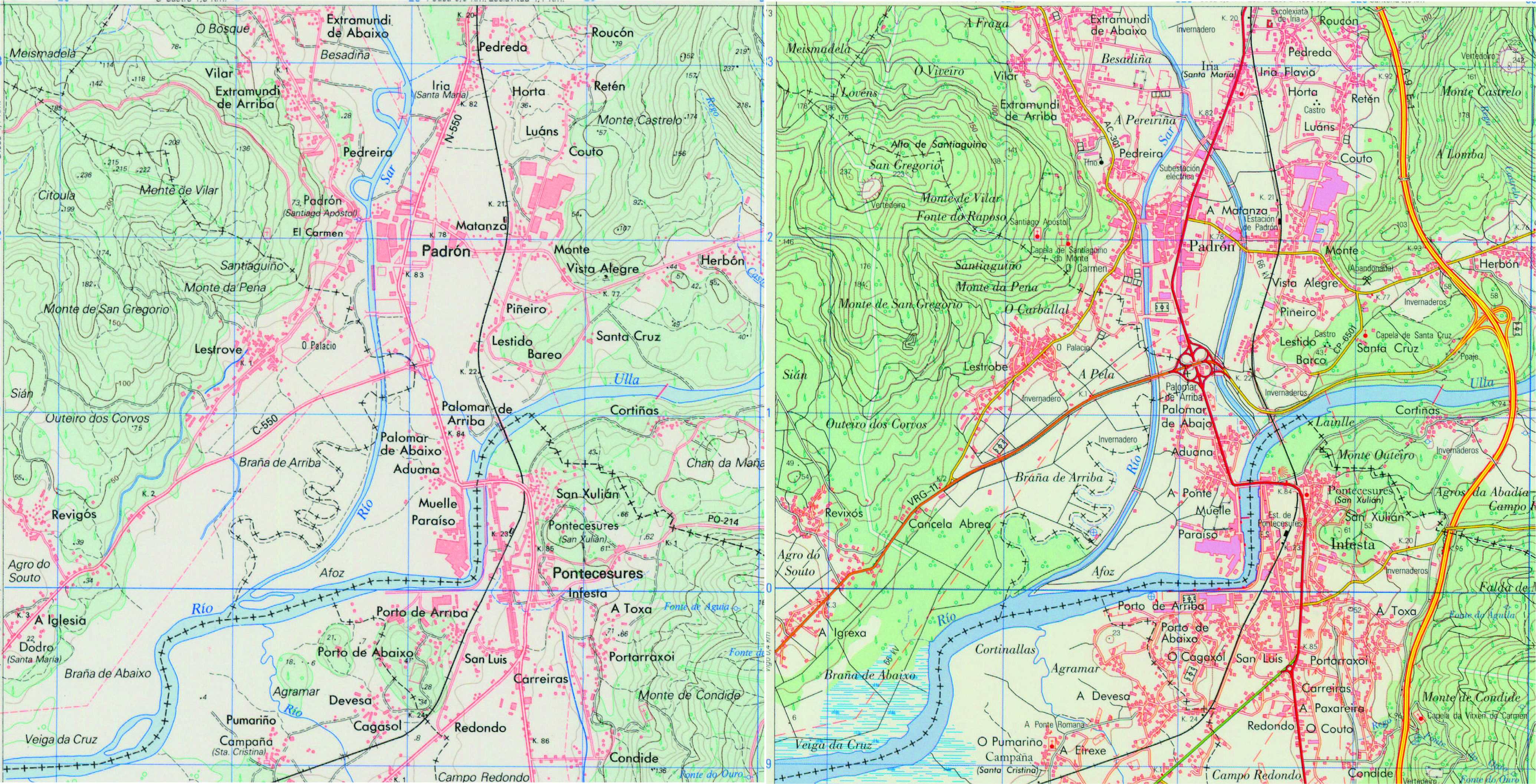 Comparativa de Padrón el su canal de derivación del Río Sar. A la izquierda mapa de 1991, a la derecha mapa de 1999. Se aprecia el canal que transcurre al este de la población y desemboca en el río Ulla dos kilómetros antes que la desembocadura antigua.